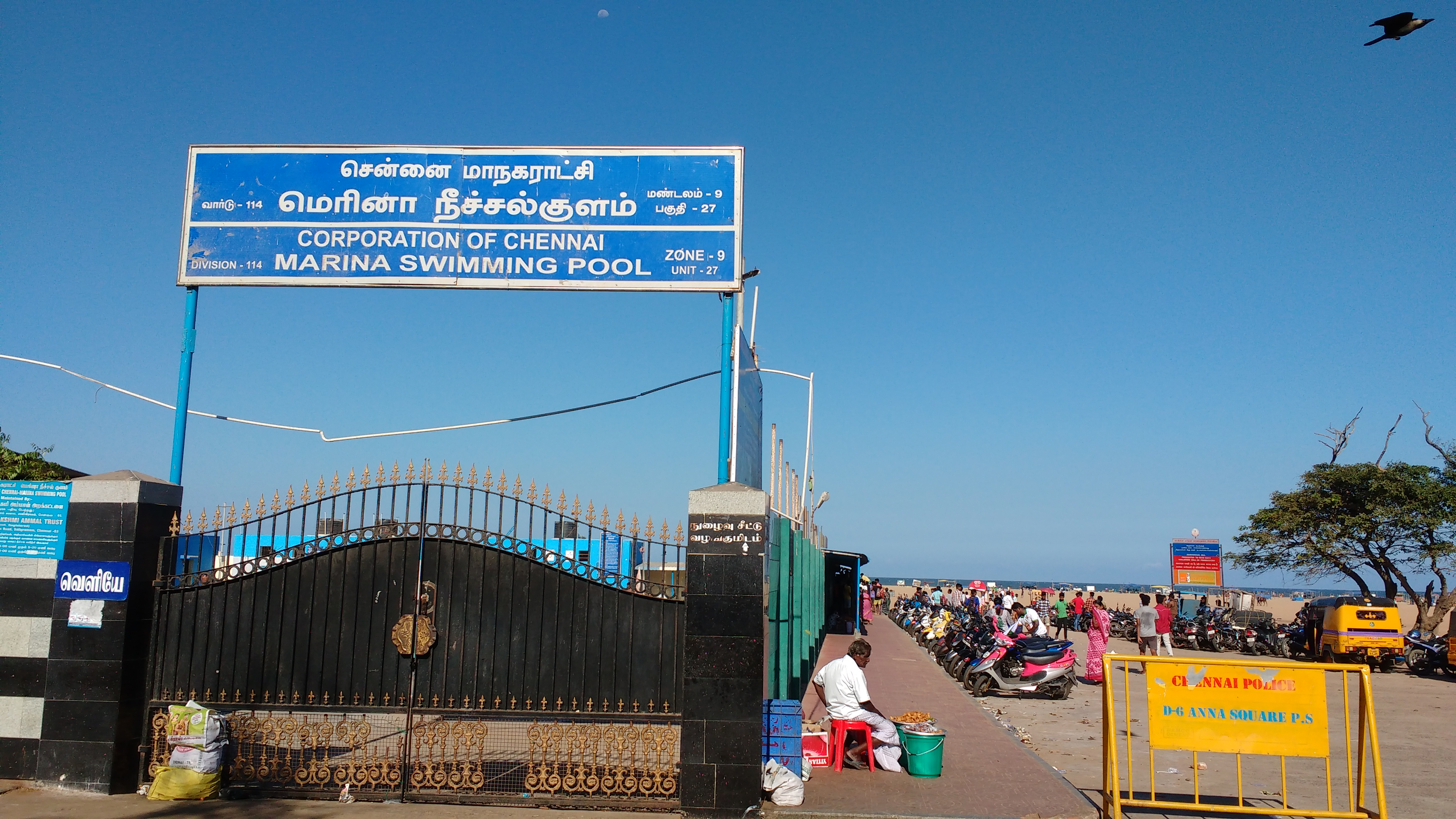 Chennai marina Swimming pool